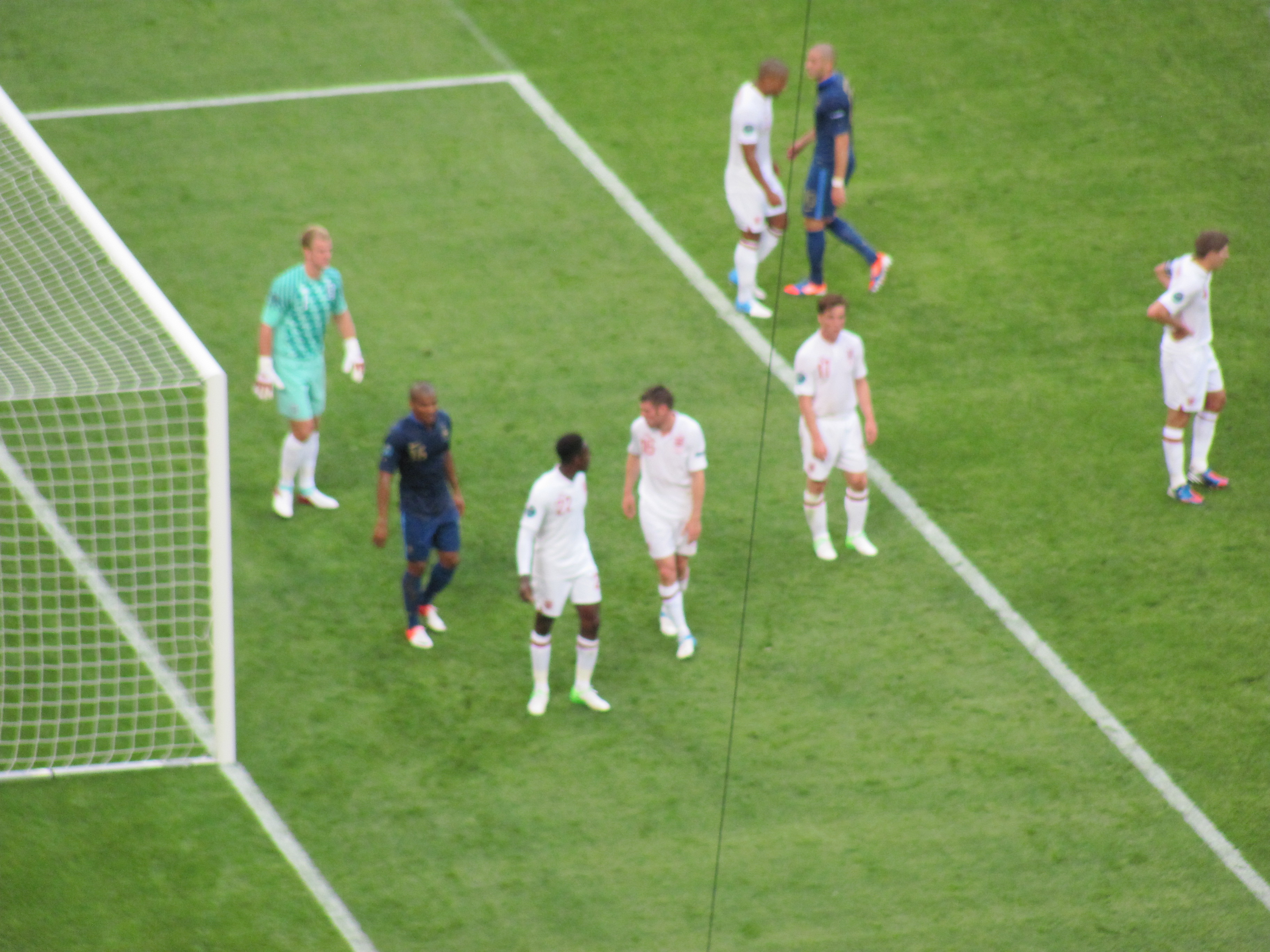 Футбольный Матч Англия-Франция. Штрафная площадь Англичан.